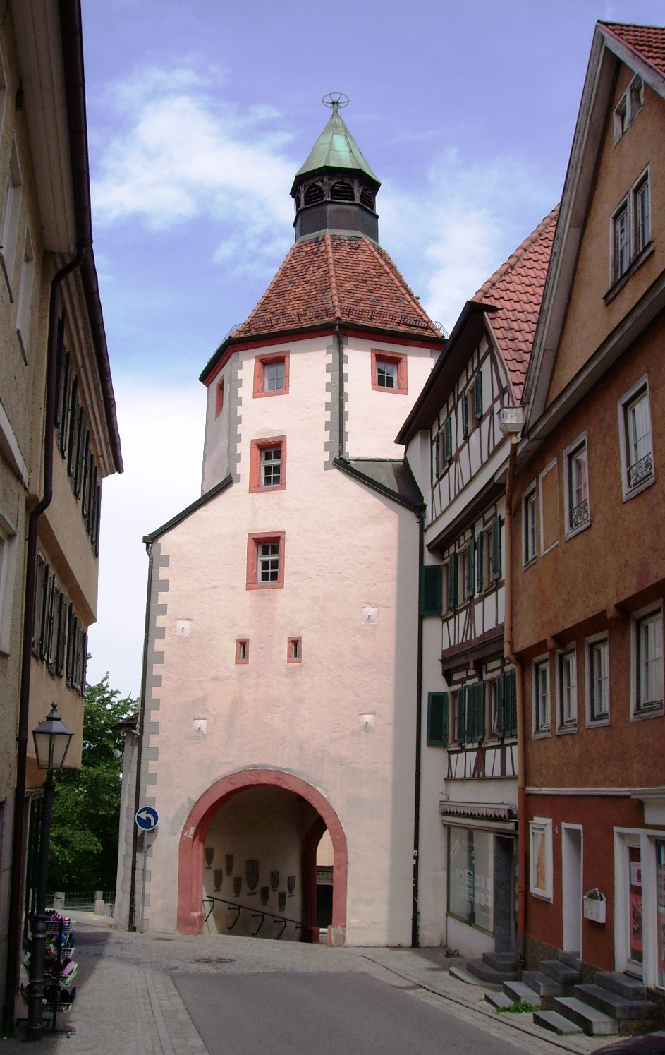 Lichtbilder von Hechingen